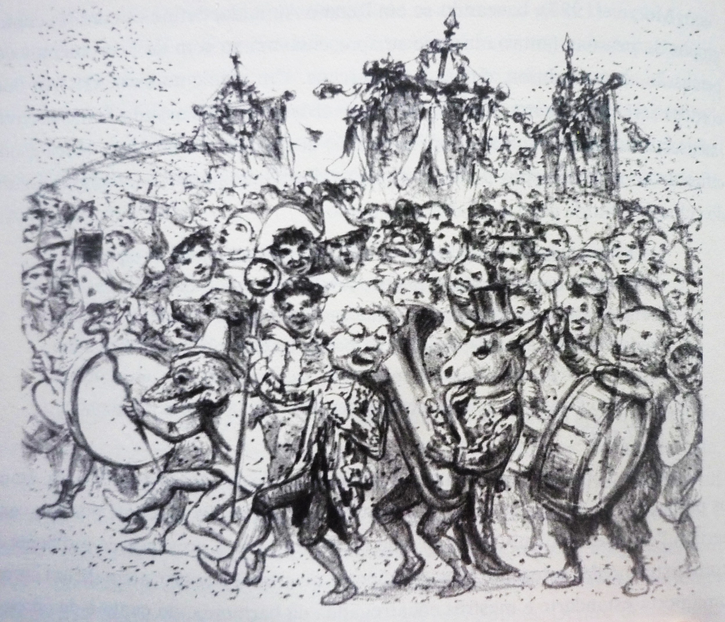 Le Carnaval de Rio, ici influencé directement par le Carnaval de Paris. Légende du dessin paru dans Don Quixote : O Carnaval no Rio de Janeiro. As familias que aguentem bisnagas e outras cousas.